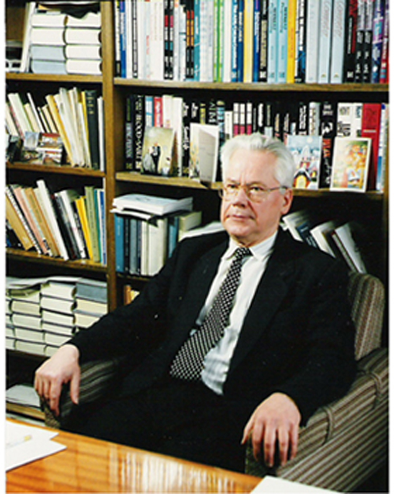 prof. J. Such już jako doktor habilitowany i docent został zastępcą dyrektora (1970 r.). Na tym stanowisku pozostał przez 9 lat, a następnie został dyrektorem Instytutu Filozofii i pełnił tę funkcję przez 20 lat.